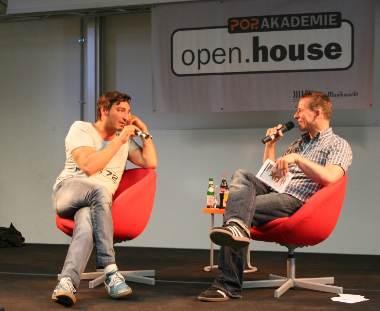 Mousse T. im Interview mit You-FM-Programmchef Jan Weyrauch (re.) in der Mannheimer Popakademie